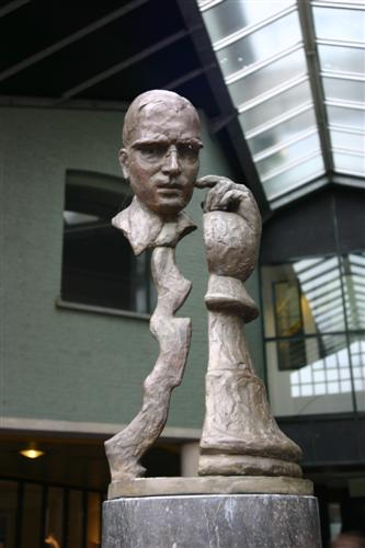 Beeld van Max Euwe. Het beeld staat in Amsterdam op het Max Euweplein. Het is vervaardigd door beeldend kunstenares José Fijnaut en is een initiatief van de ondernemersvereniging Max Euweplein